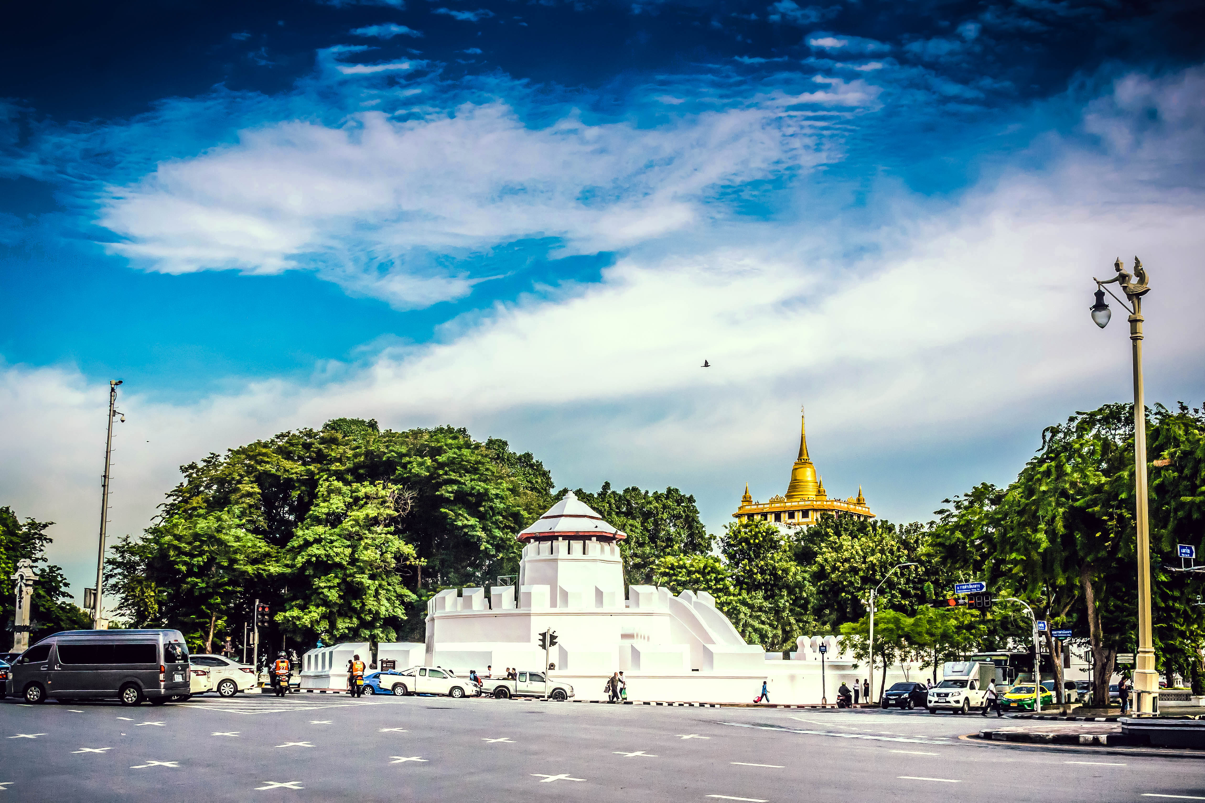 ป้อมมหากาฬพร้อมด้วยปราการ